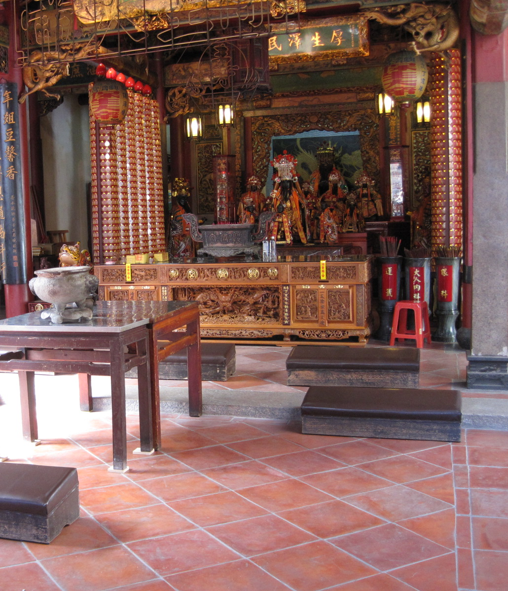 臺南興濟宮正殿